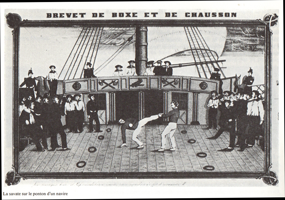 Marins Français pratiquant la Savate sur les navires